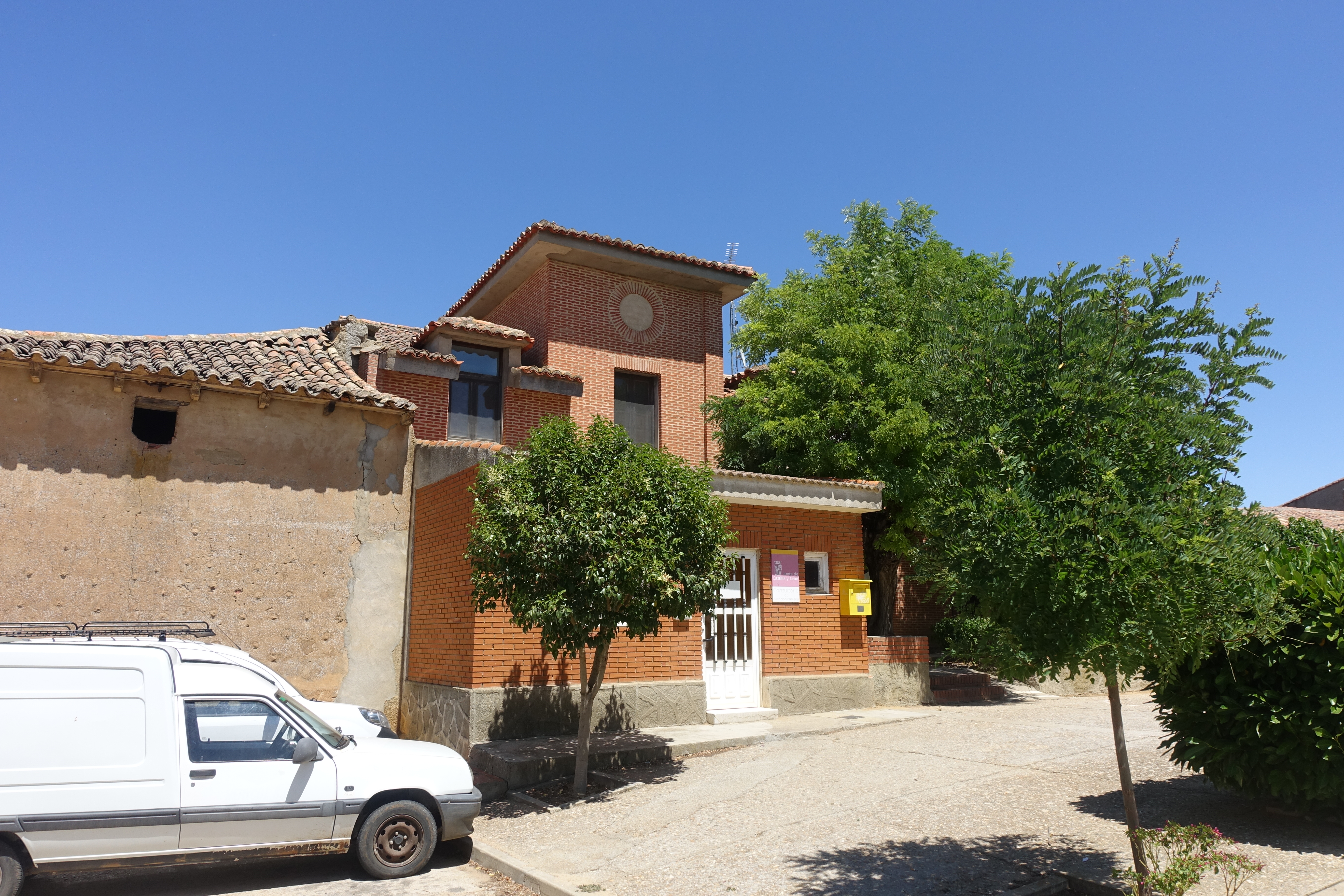 Casa consistorial de Pozuelo de la Orden (Valladolid, España).